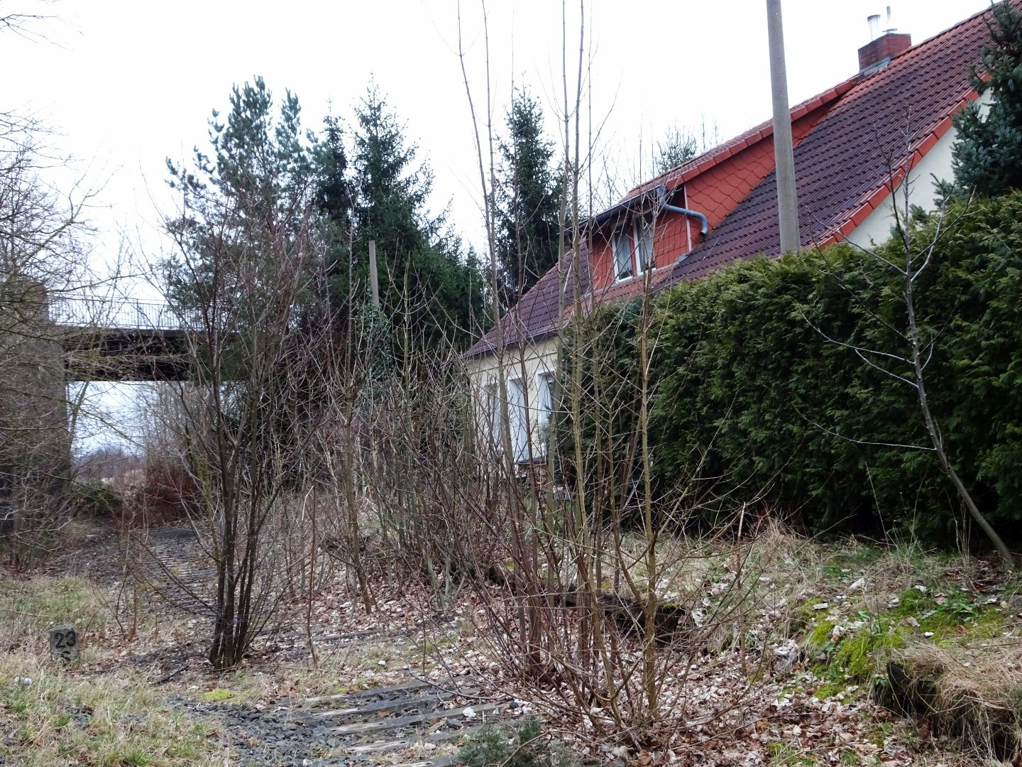 Haltepunkt in Gundorf an der ehem. Bahnlinie Leipzig-Merseburg